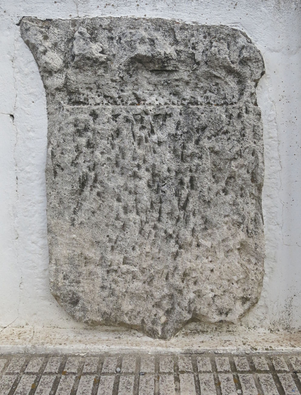 Projecte de col·laboració de l'Arxiu Ismael Latorre Mendoza amb Wikimedia Commons i Amical Wikimedia. Escut picat pels llauradors, durant la Segona Germania (1693) en senyal de protesta contra els Senyors. Aquest escut d'armes encara es pot veure a l'església del poble del Ràfol d'Almúnia.